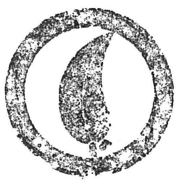 新見家家紋